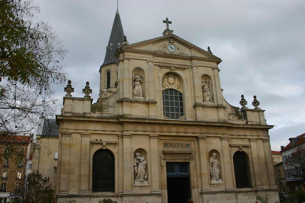 Eglise Saint Pierre Saint Paul - Rueil-Malmaison - façade